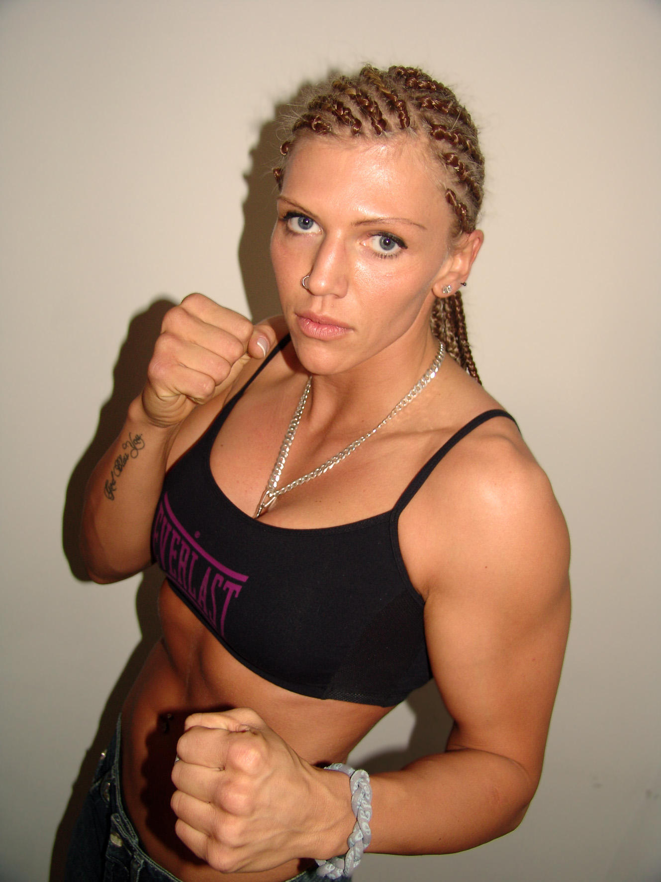 A lutadora sérvia radicada no Brasil, Duda Janković.